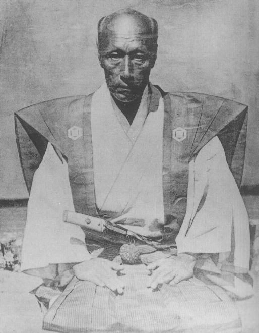 堀直格。Hori Naotada.